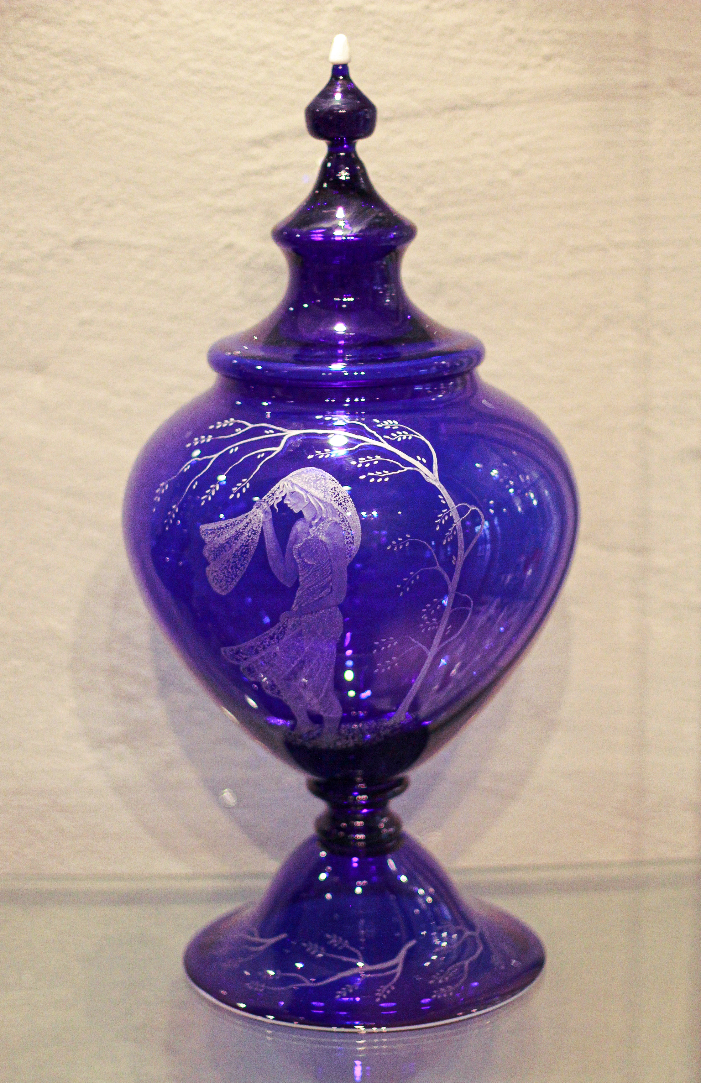 Blått gjøvikglass med kvinnemotiv.